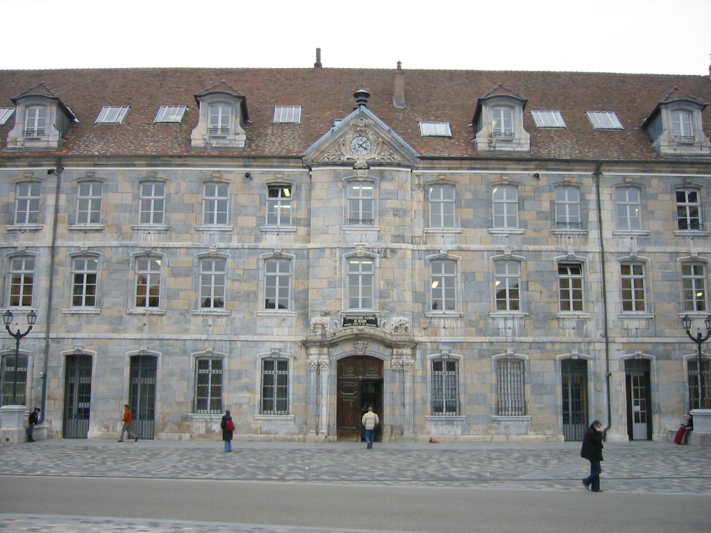 Conservatoire de Musique de Besançon. Il abritait jadis, l'école d'horlogerie, avant qu'elle ne soit transférée au lycée Jules Haag. - Place de la Révolution